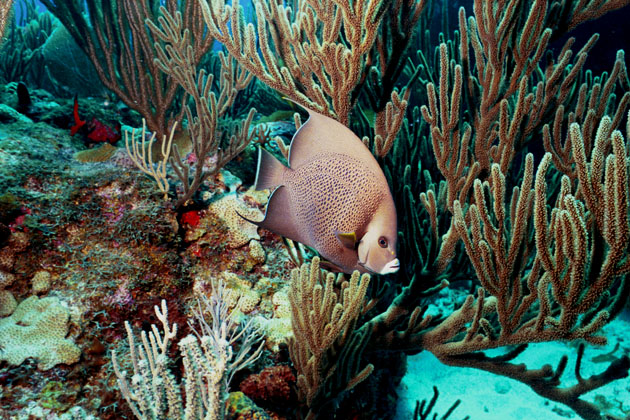 Photo prise à Saint-Martin